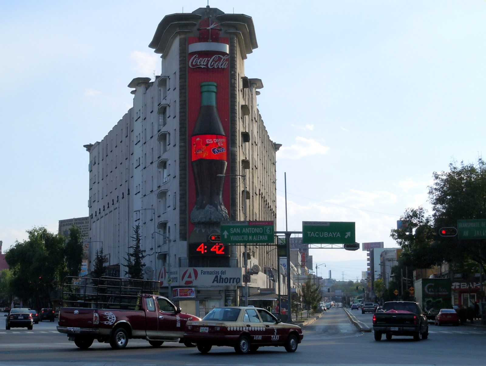 Edificio Ermita, del arquitecto Juan Segura, en el cruce de avenida Revolución y Jalisco. Ciudad de México.